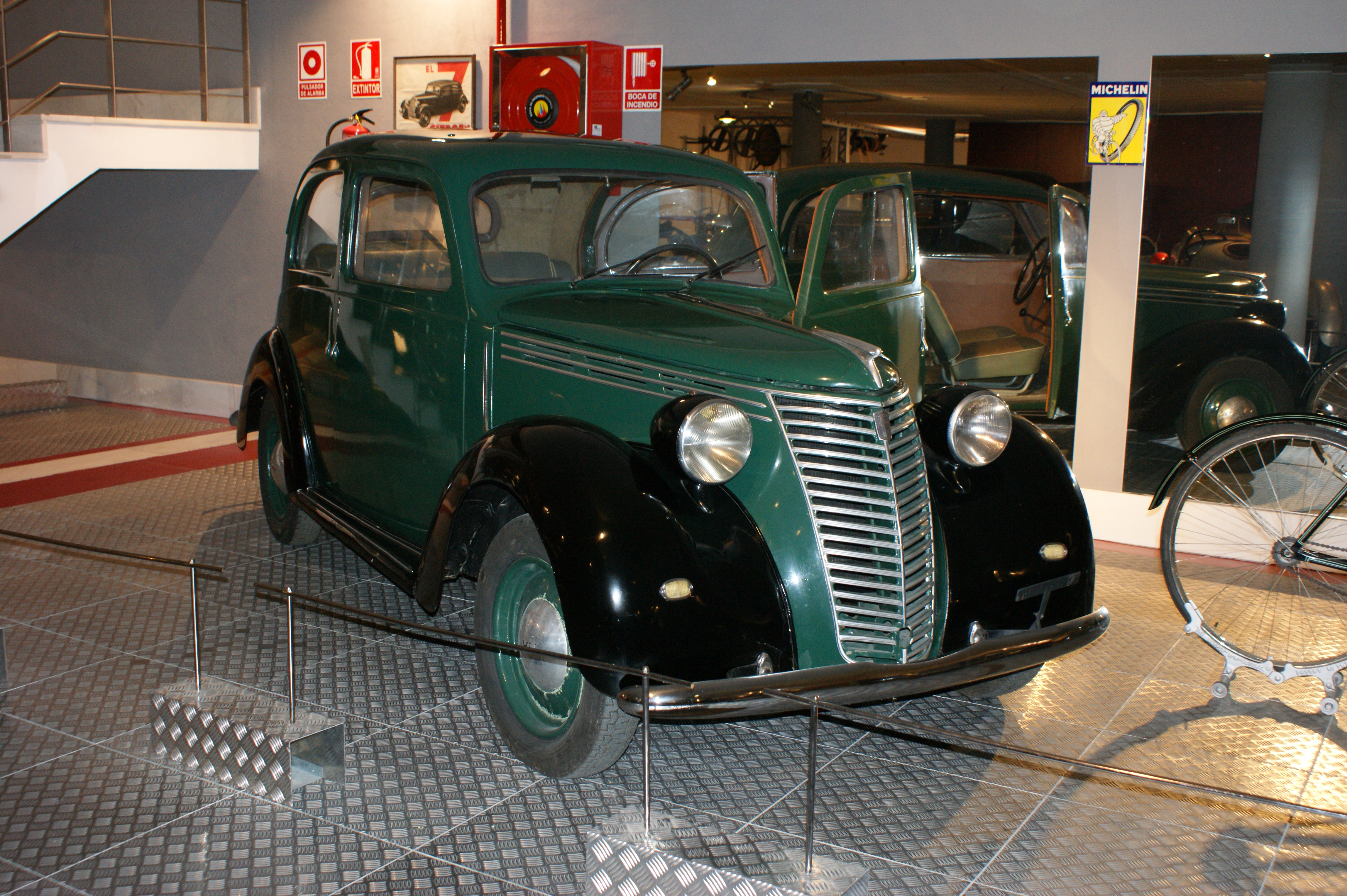 at the Salamanca Motor Museum, 04/08. Museo de Historia de la Automoción de Salamanca Native nameMuseo de Historia de la Automoción (Salamanca)LocationSalamanca, (Spain)Coordinates40° 57′ 29.73″ N, 5° 40′ 00.95″ W Established2002Web page control : Q6034050 institution QS:P195,Q6034050